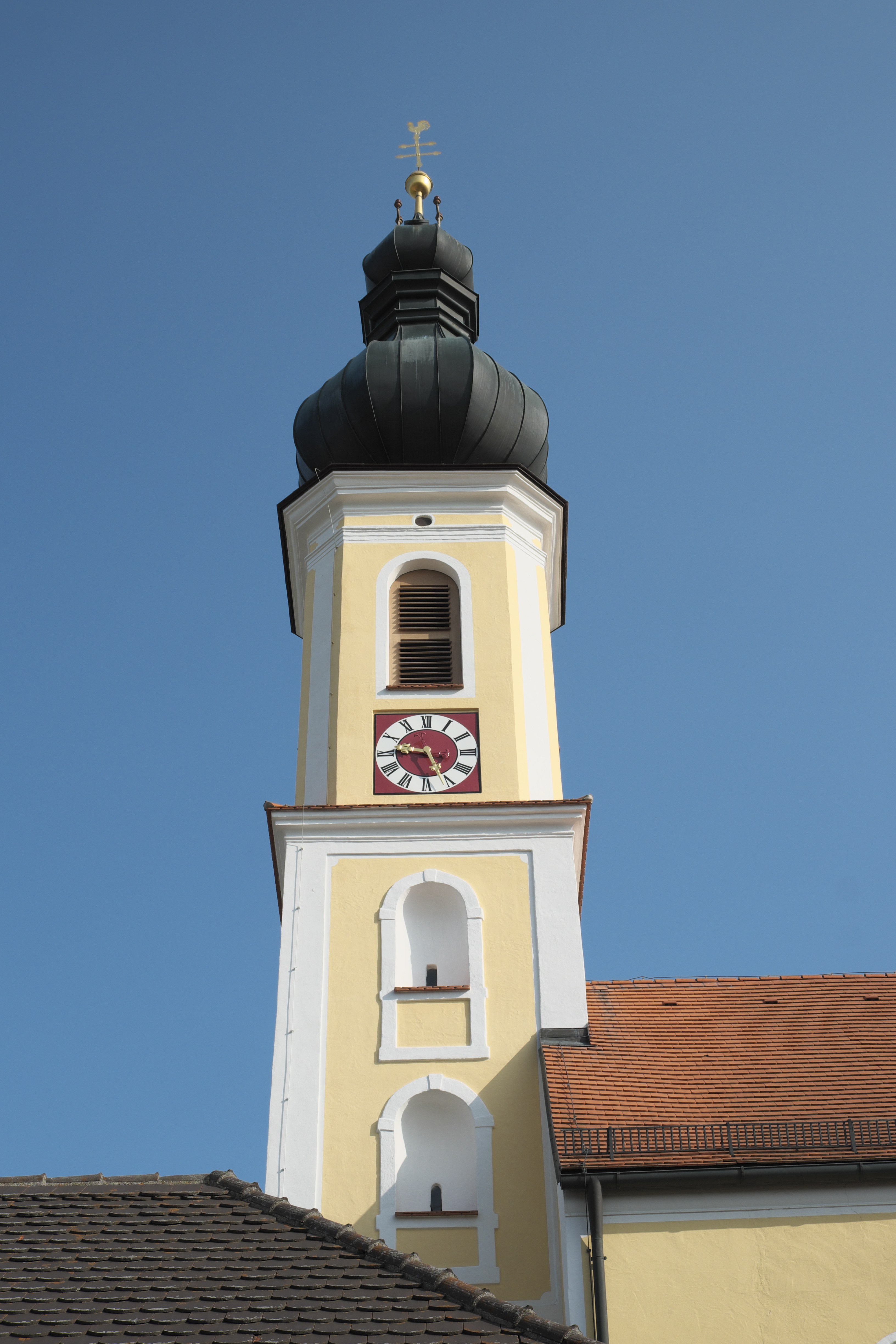 Katholische Filialkirche St. Vitus in Grucking (Fraunberg) im Landkreis Erding (Bayern/Deutschland), Glockenturm